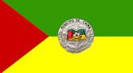 Bandera del municipio de Chima